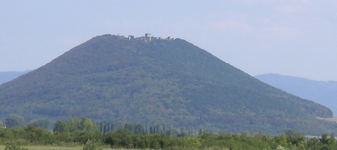 Šarišský hrad od SZ Kategória:Panorámy